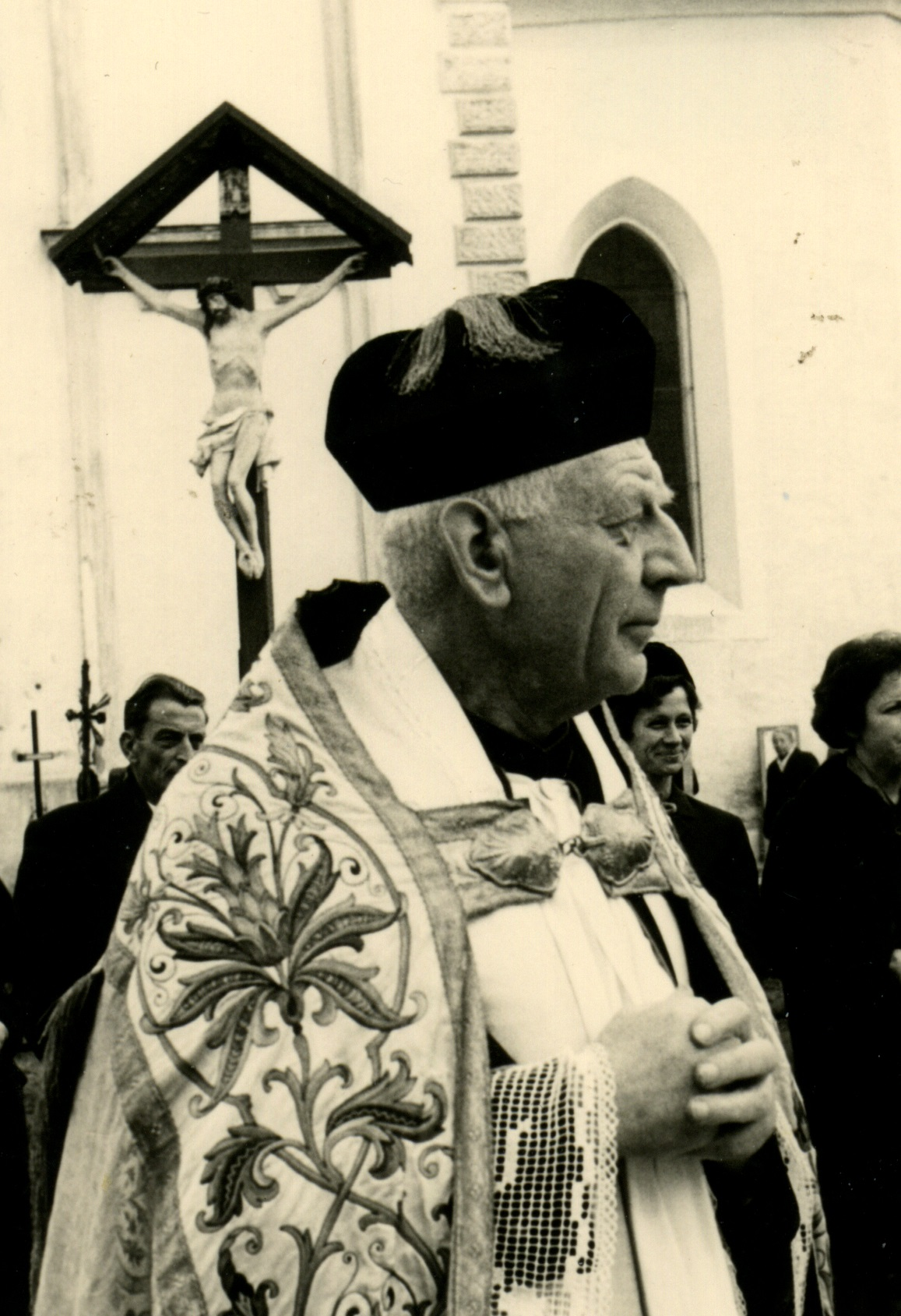 Msgr Schelling ca. 1965 (* 26. September 1906 in Buch, Vorarlberg; † 8. Dezember 1981 in Rum, Tirol) war katholischer Priester, Chefredakteur sowie Häftling und Lagerdekan im KZ Dachau. Bild Xaver Bechtiger